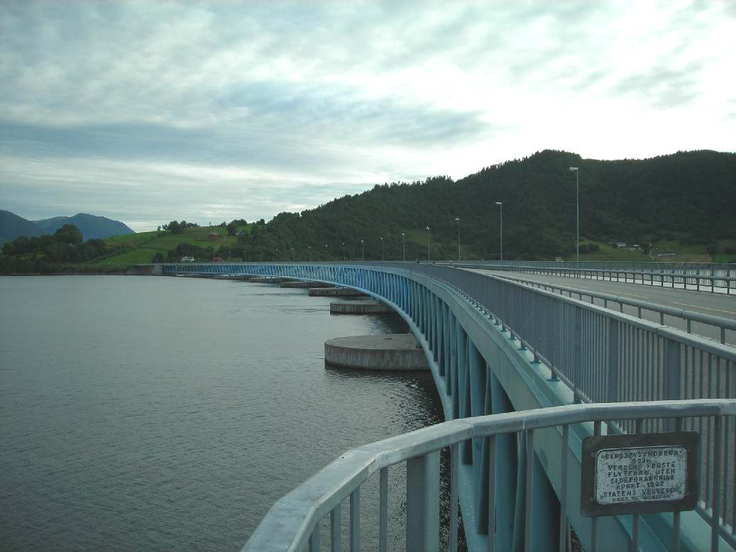 Bergsøysund bridge, near Kristiansund, Norway